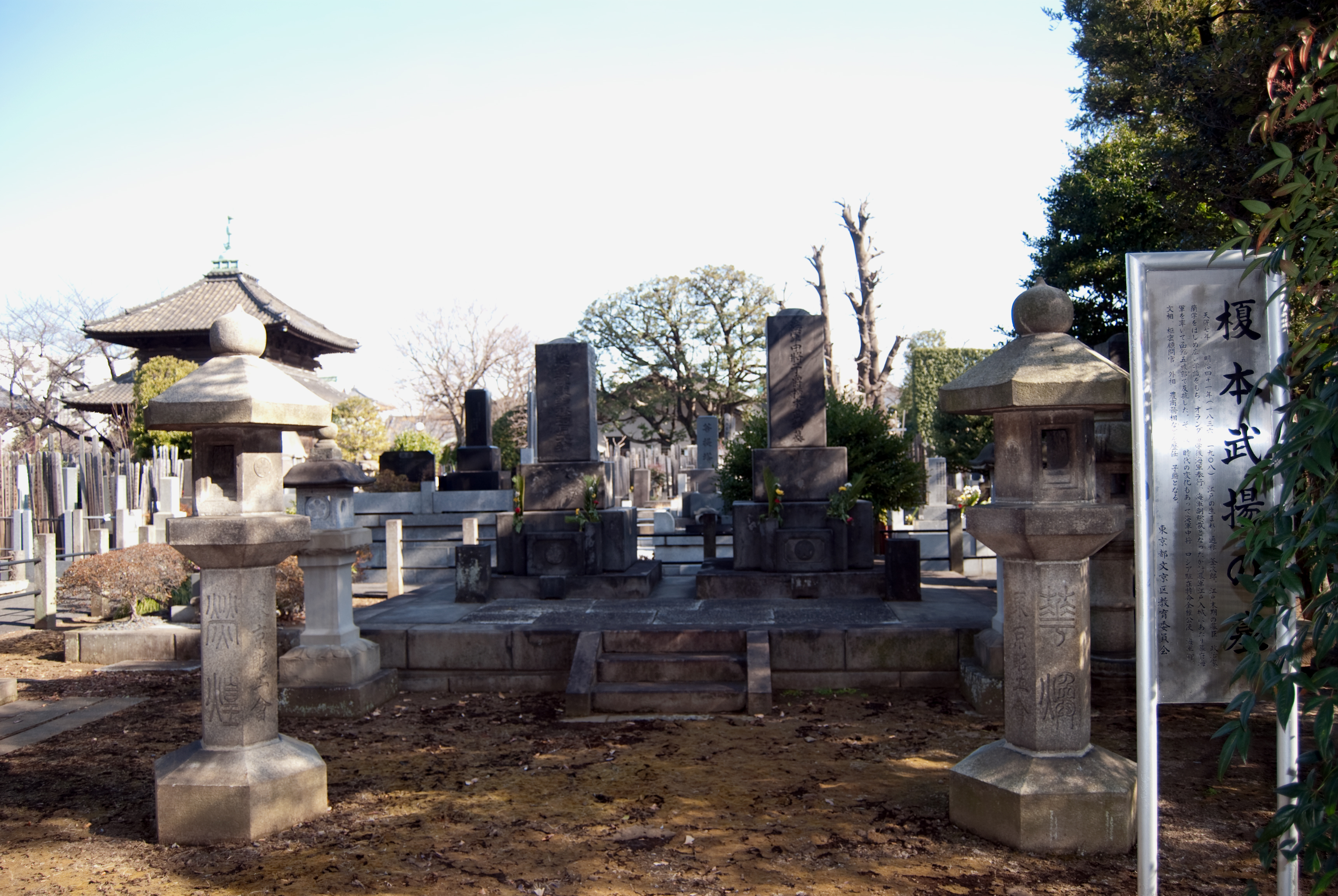 吉祥寺 (文京区)にあるw:ja:榎本武揚のw:ja:墓